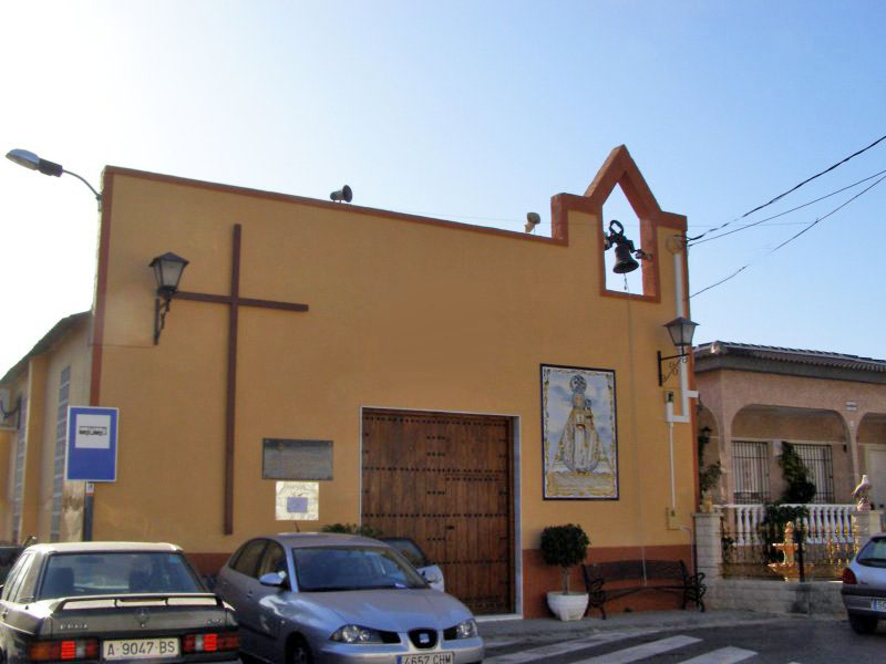 Ermita de La Fuensanta